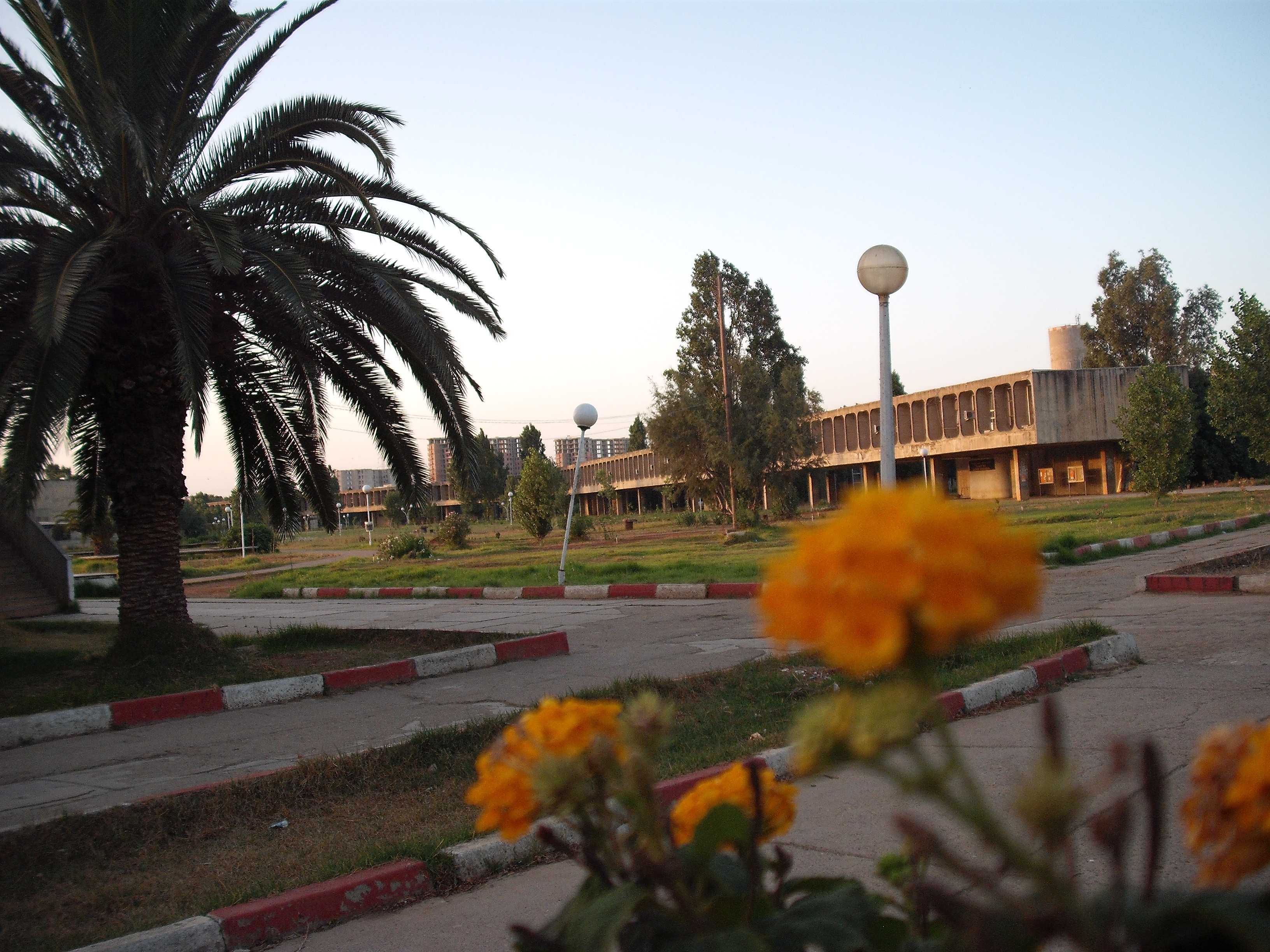 Belle photos de l'USTHB